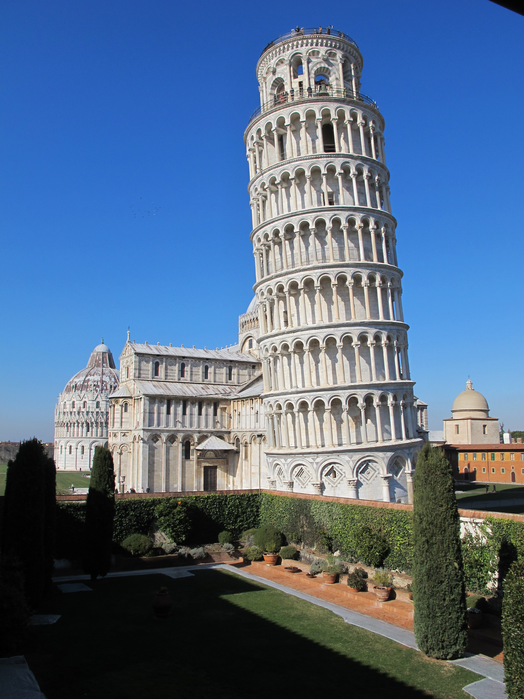 Torre di pisa vista dal cortile dell'opera del duomo